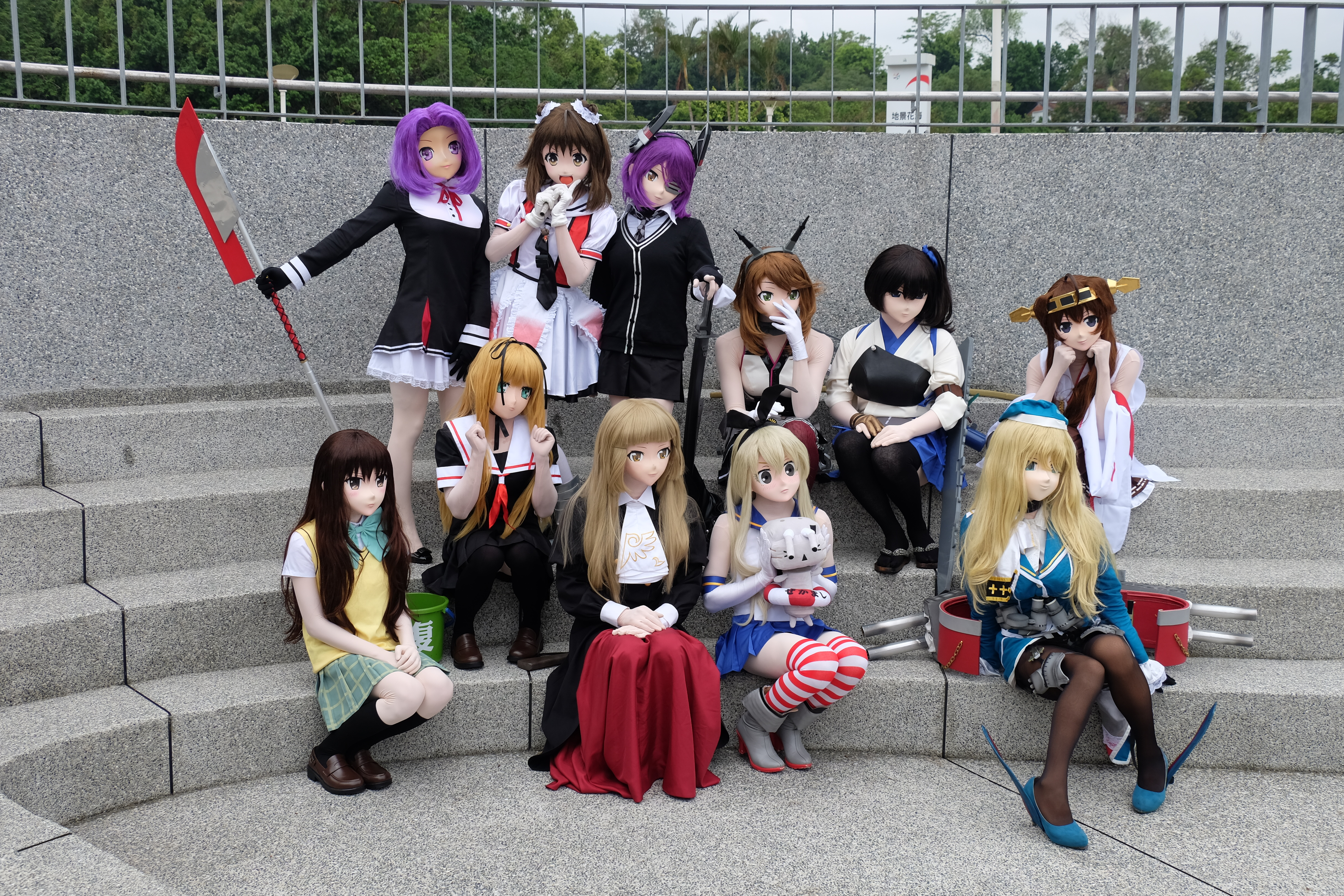 Fancy Frontier 26第一日中午場外花博公園，《艦隊Collection》布偶裝艦娘與《出包王女》古手川唯cosplayer（左下）合影。